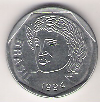 Verso da moeda de 25 centavos da primeira geração. This graphic was created with GIMP.